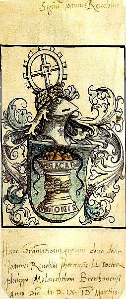 Widmung Reuchlins (mit dem Wappen Reuchlins) in Melanchthons griechischem Wörterbuch